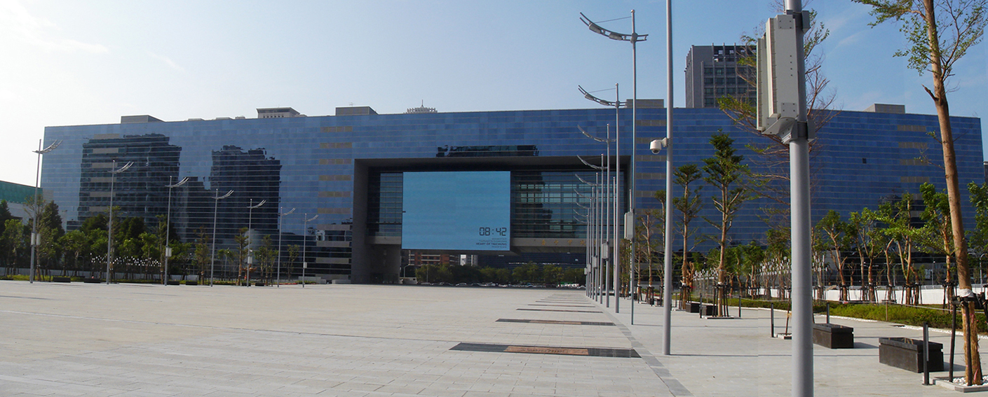 七期重劃區的台中新市政府大樓